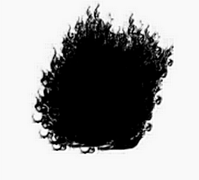 Template:Изображение Amaterasu-Fire